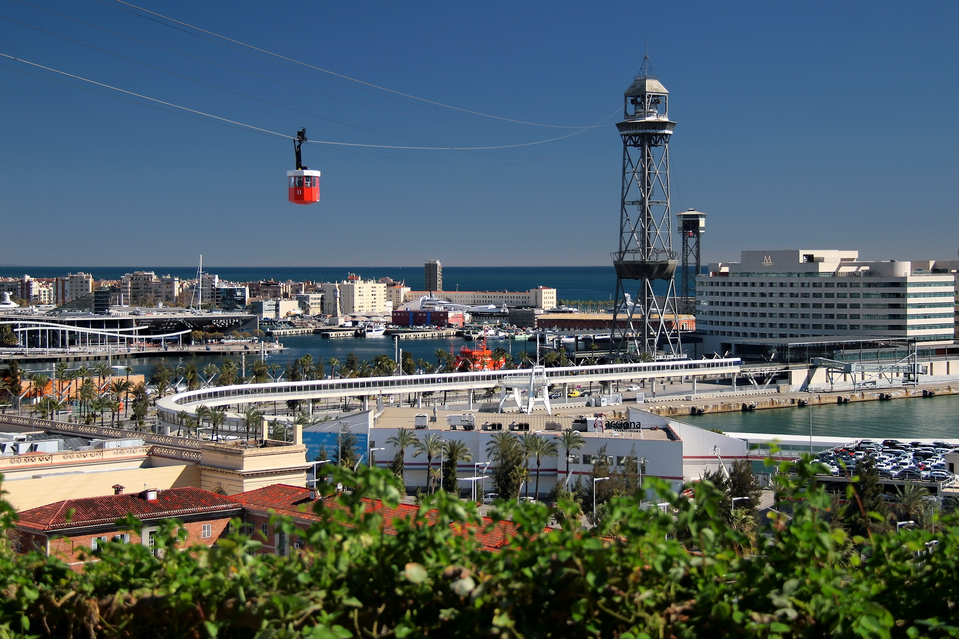 Barcelona